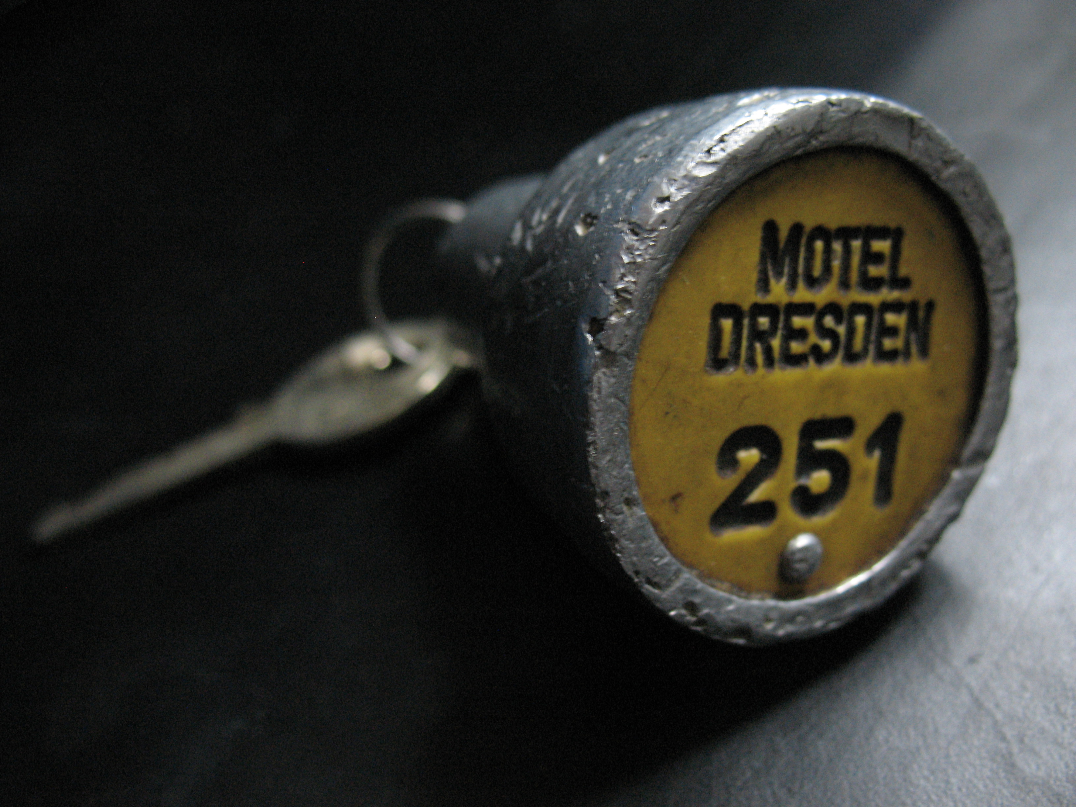 Zimmerschlüssel des Motels Münzmeisterstraße (Interhotel) in Dresden